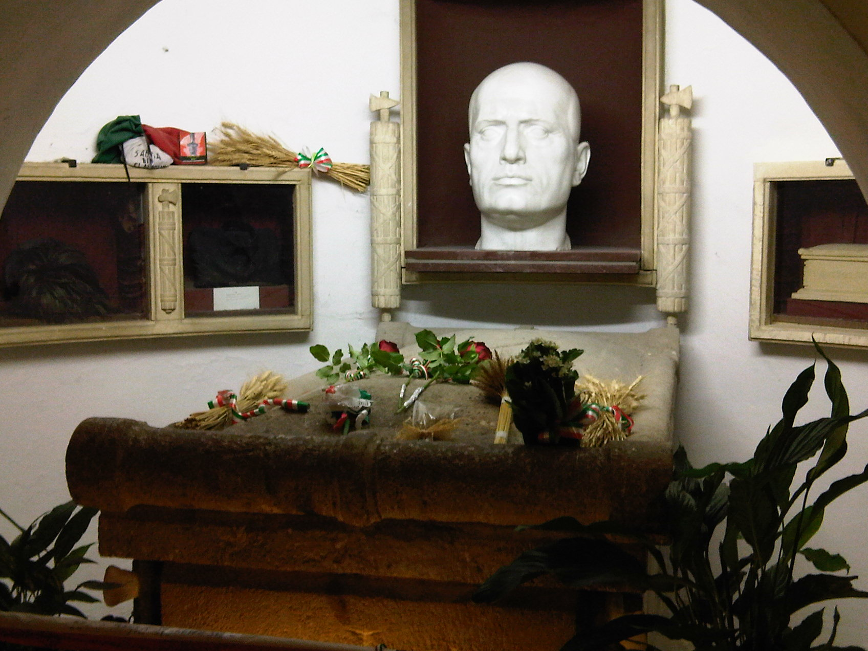 Tomba di Benito Mussolini nella Cripta di famiglia nel cimitero di Predappio